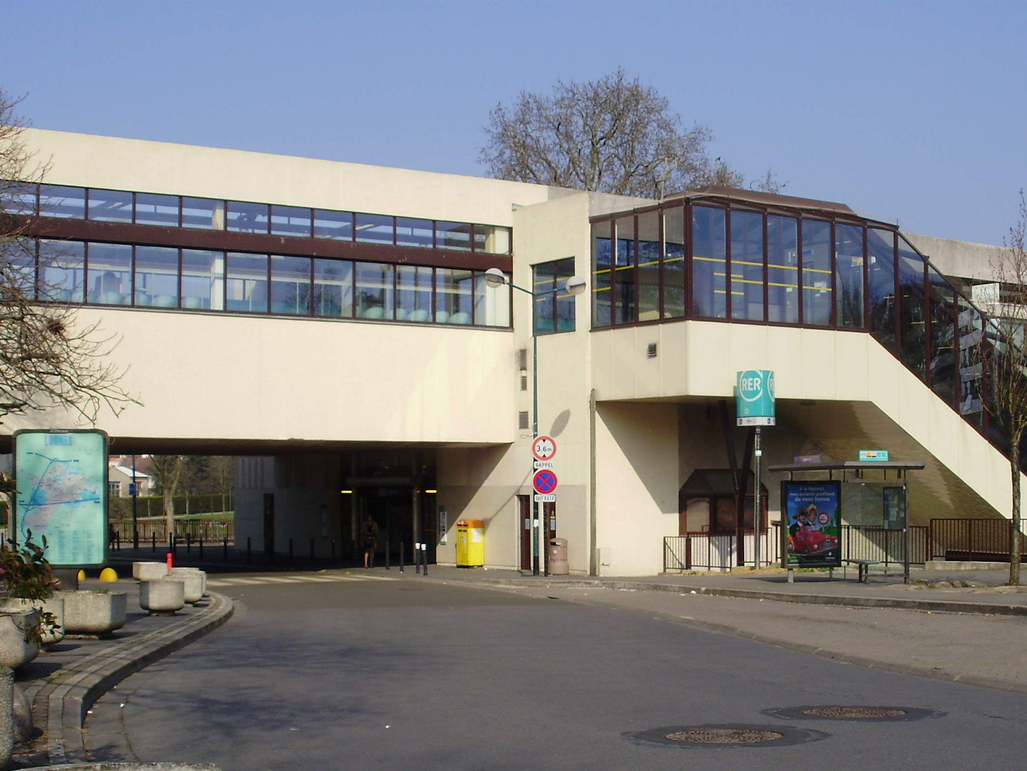 Gare de Lognes, Seine-et-Marne, France : bâtiment voyageurs vu du côté sud, rue Jehan Scarron